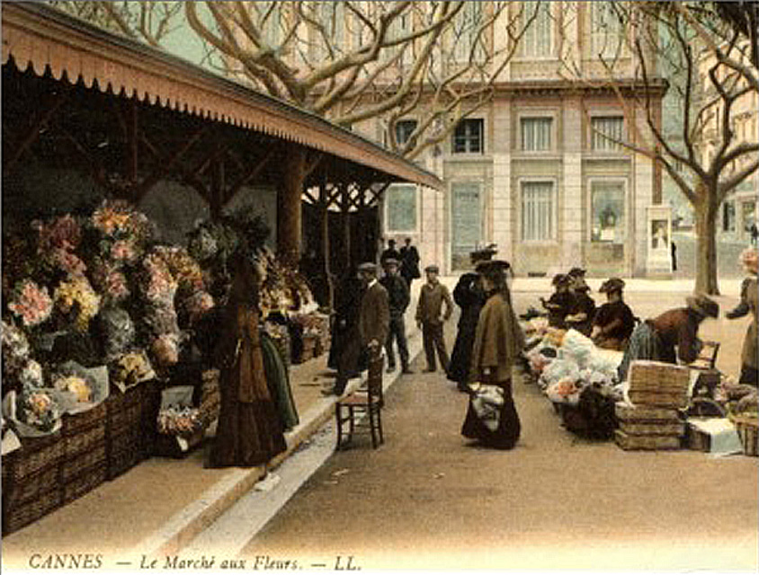 Cannes le marché aux fleurs en 1915